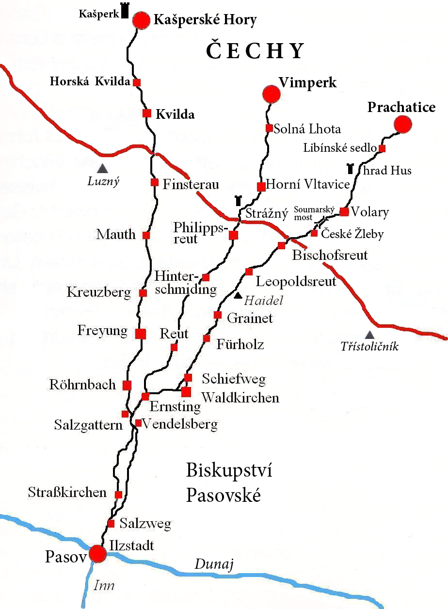 „Zlatá stezka", soustava obchodních cest vedoucích z Pasova do Čech, po kterých se intenzivně přepravovalo zboží především od druhé poloviny 14. století do počátku 17. století. Prachatická větev je doložená od roku 1010 Vimperská větev byla využívána přibližně od roku 1300 Kašpersko Horská větev vznikla jako poslední kolem roku 1356